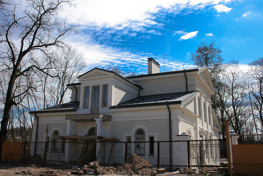 Tuskulėnai manor palace, still under construction